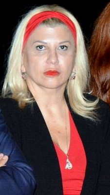 Dounia Bouzar lors d'une avant-première du film "Le Ciel attendra"